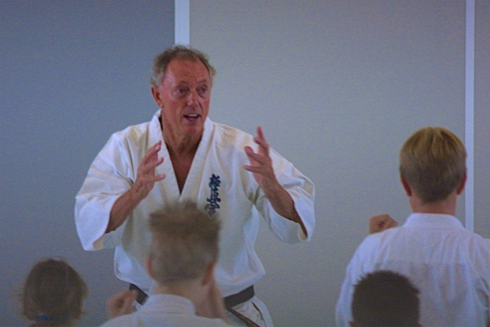 Shihan Hollander geeft uitleg over karate.